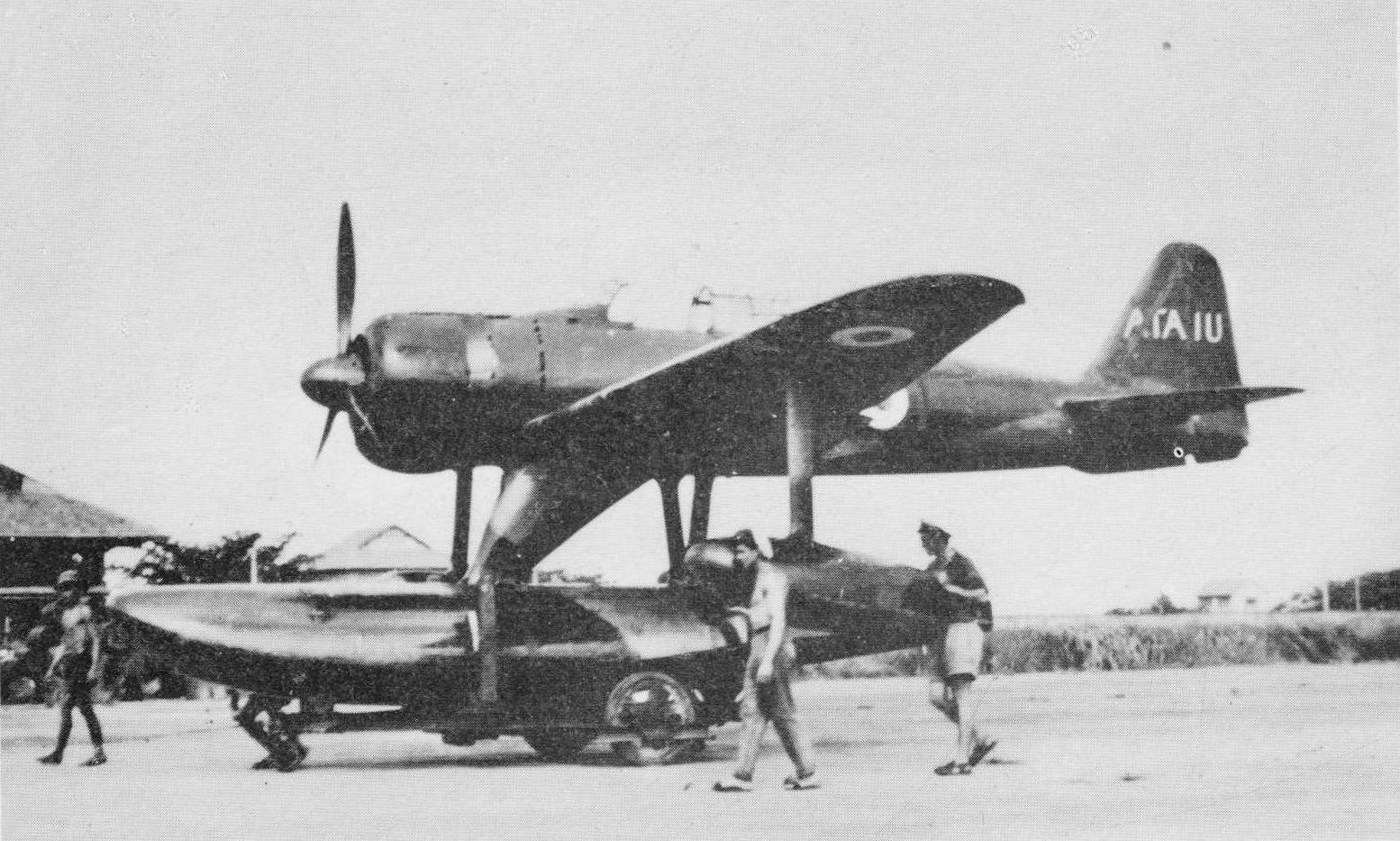 Nakajima A6M2-N Rufe con insegne Aéronavale, Indocina, data e luogo della scatto imprecisati.